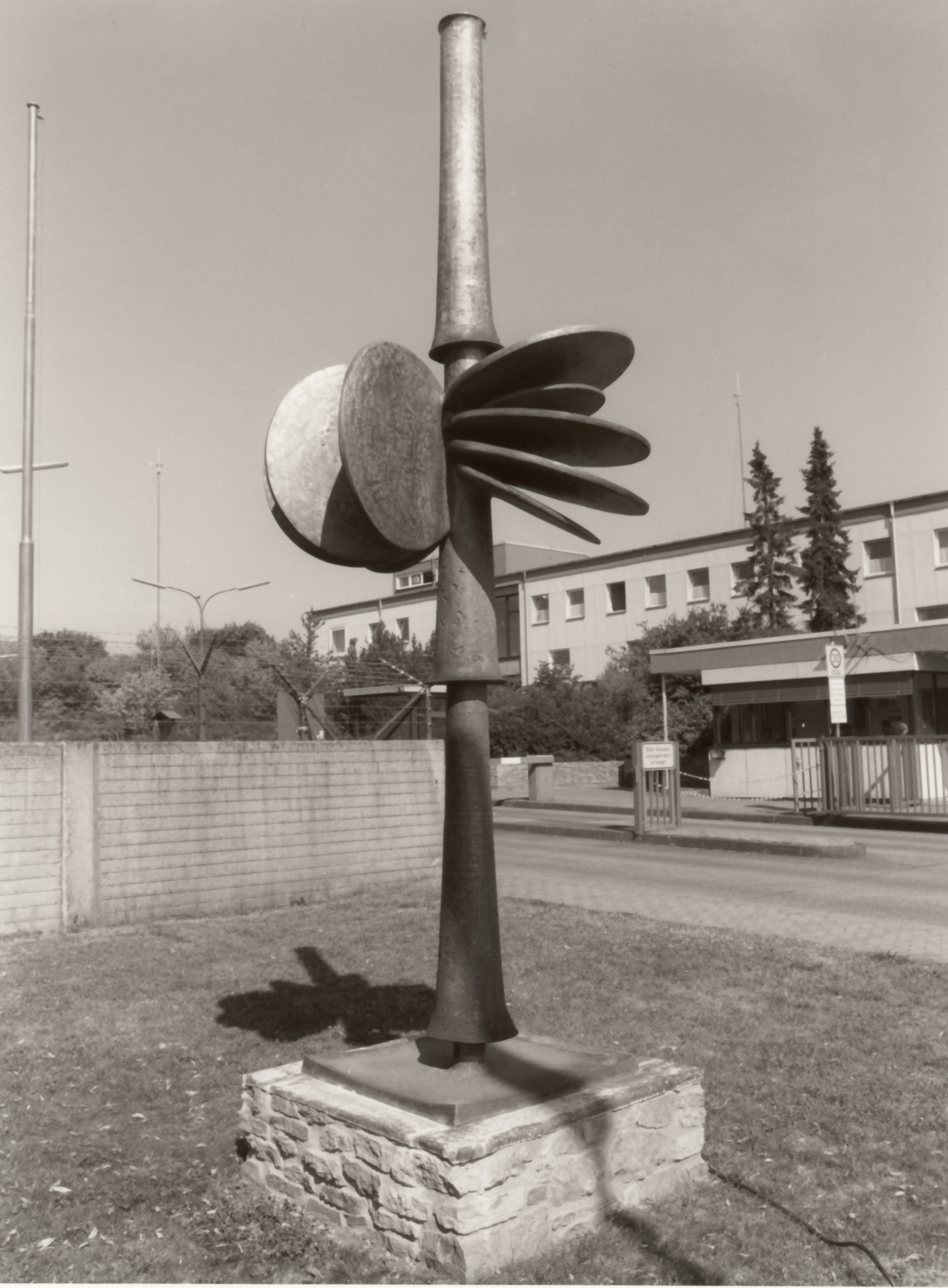 reflektierte Schirmschilde des Bildhauers Johannes Kirsch aus Petersberg